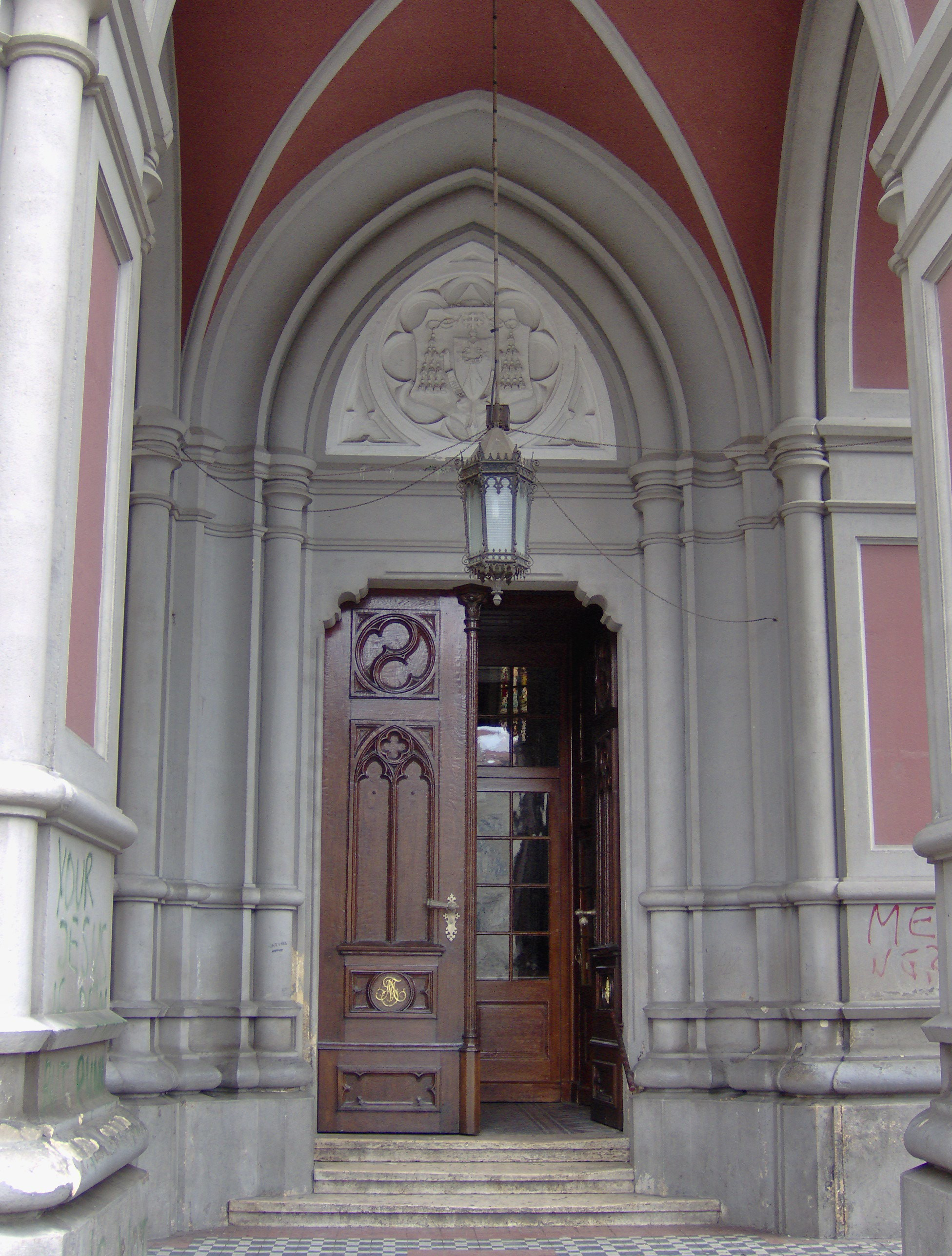 Улаз у Цркву имена Маријиног